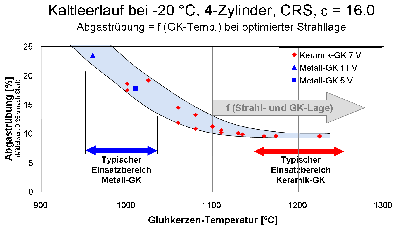 Einsatzbereich metallischer und keramischer Glühkerzen: Einfluss der Gühkerze auf die Abgastrübung.